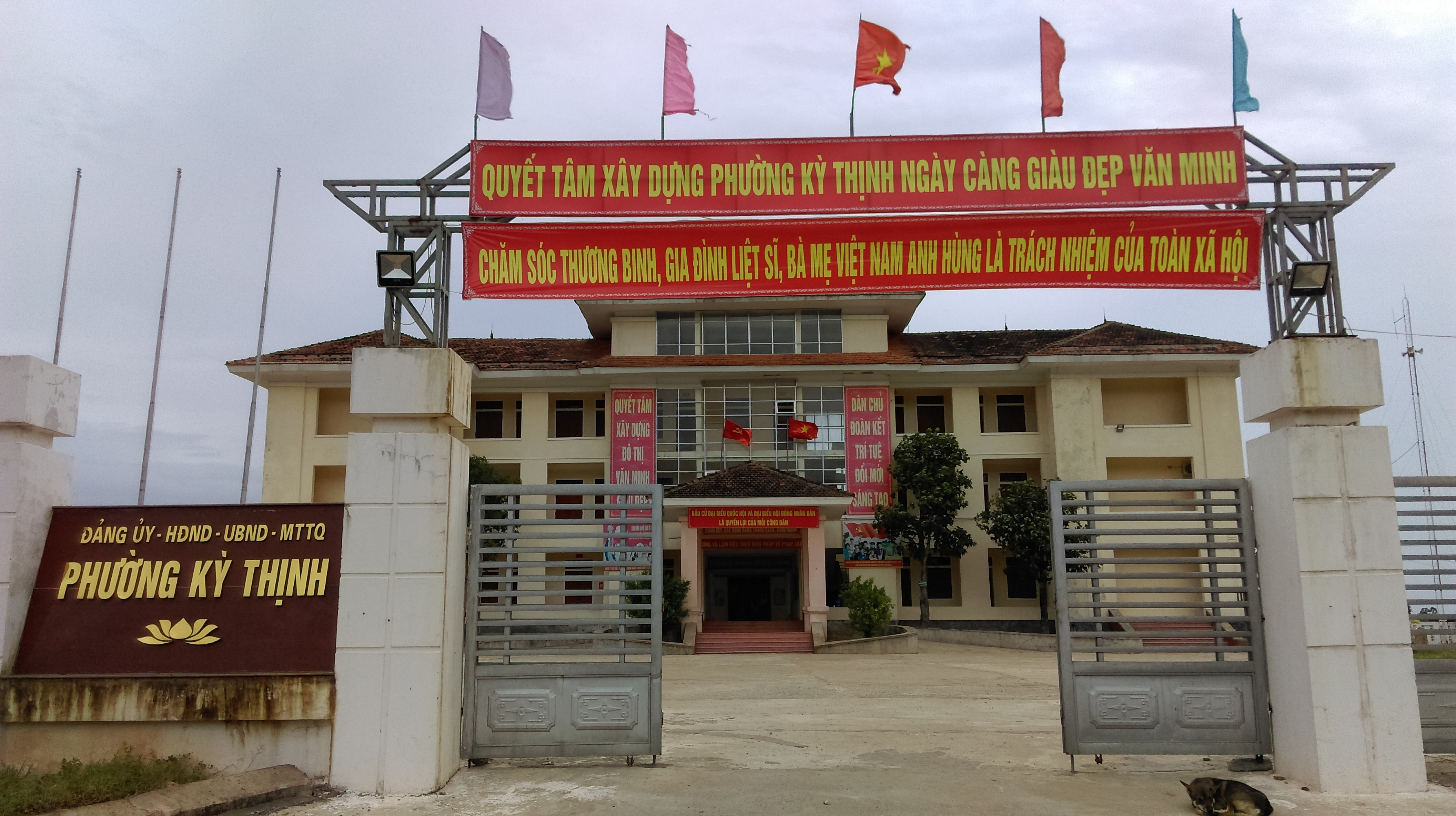 UBND phường Kỳ Thịnh, Kỳ Anh, Hà Tĩnh